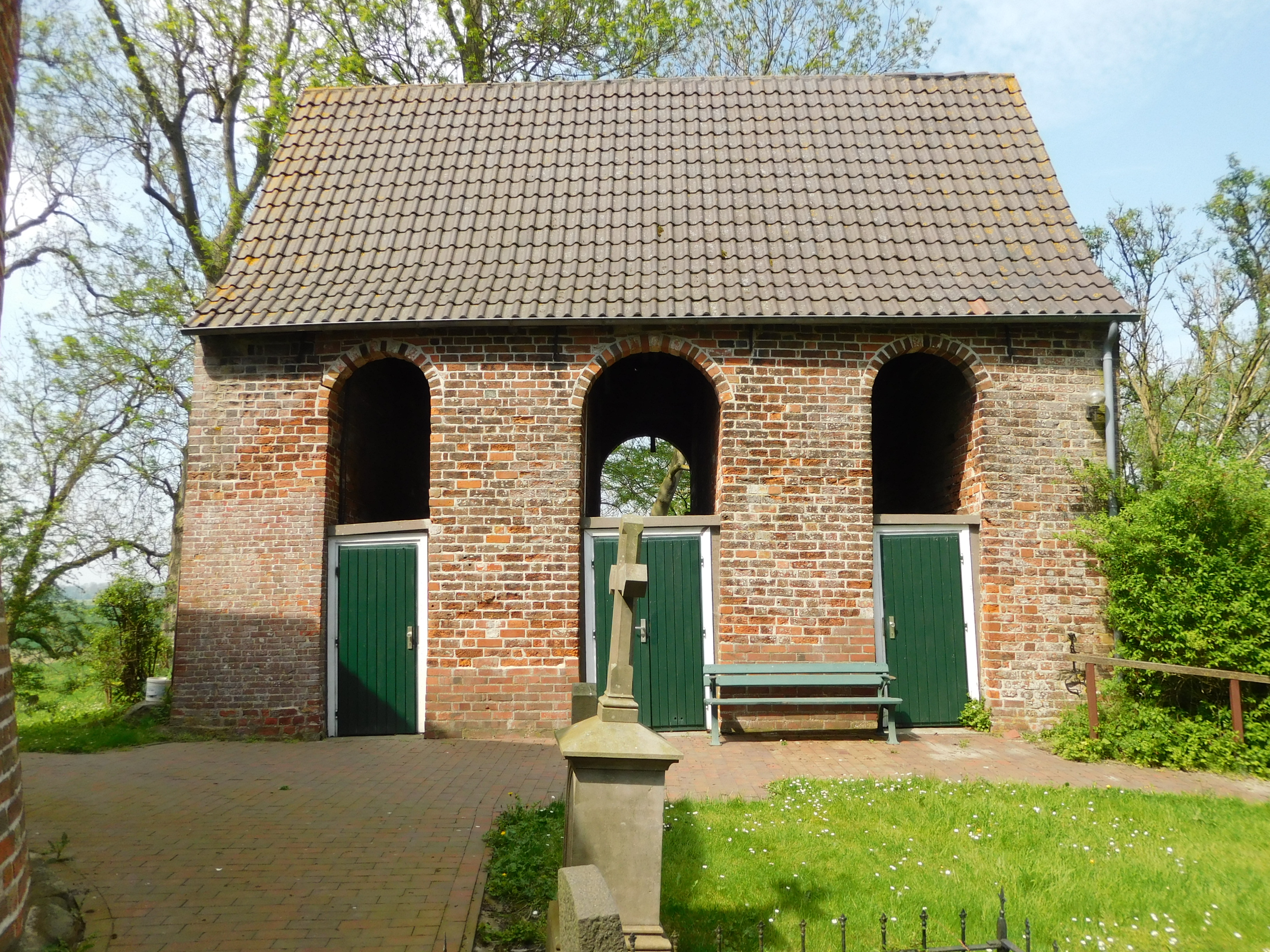 Freistehender Glockenturm der evangelisch-lutherischen Kirche Wüppels